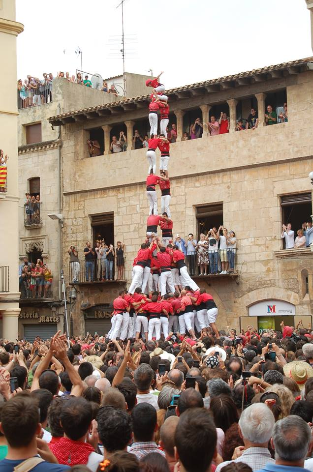 2d9fm cjxv sant fèlix 2016 Roser Giner